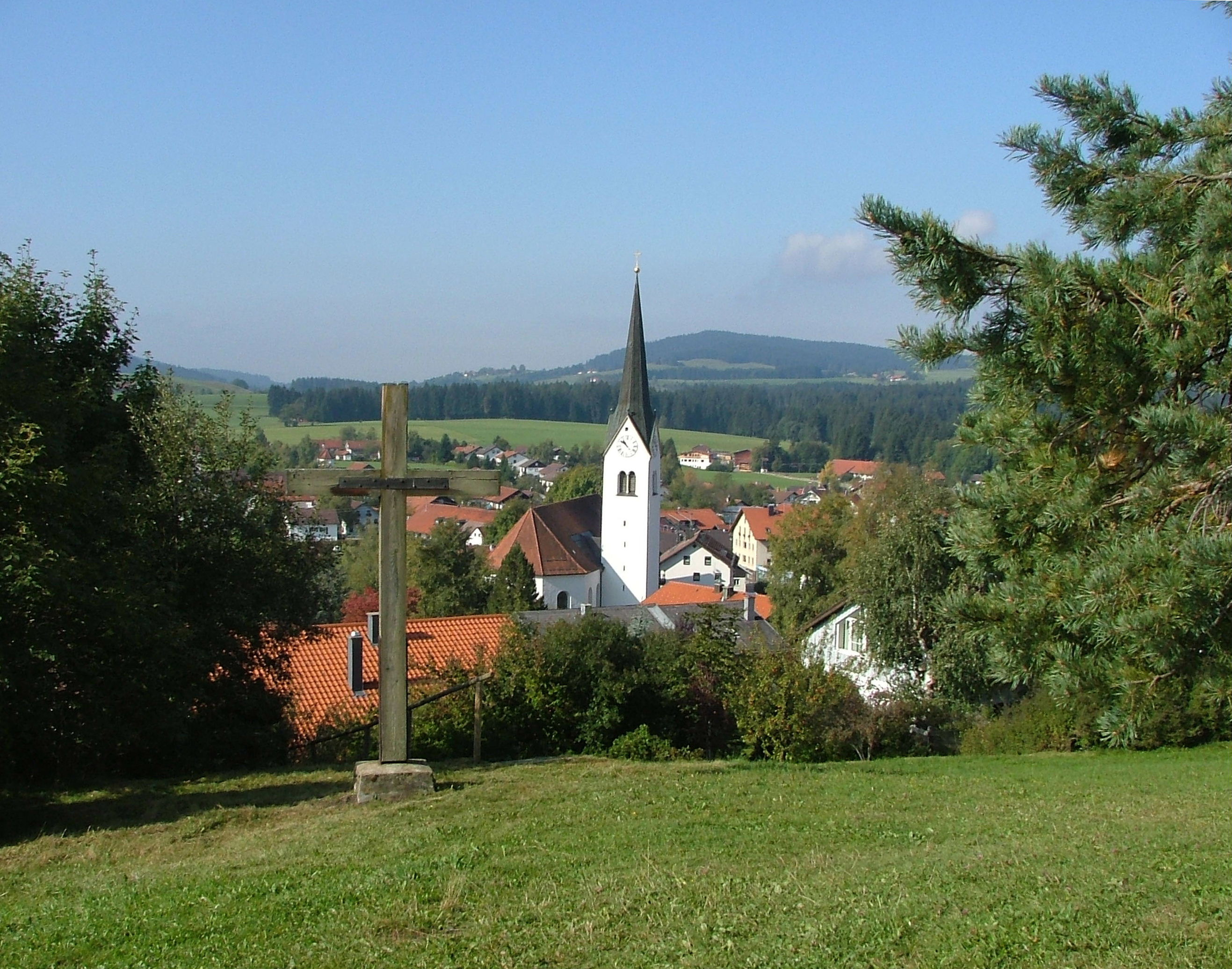 Magnus